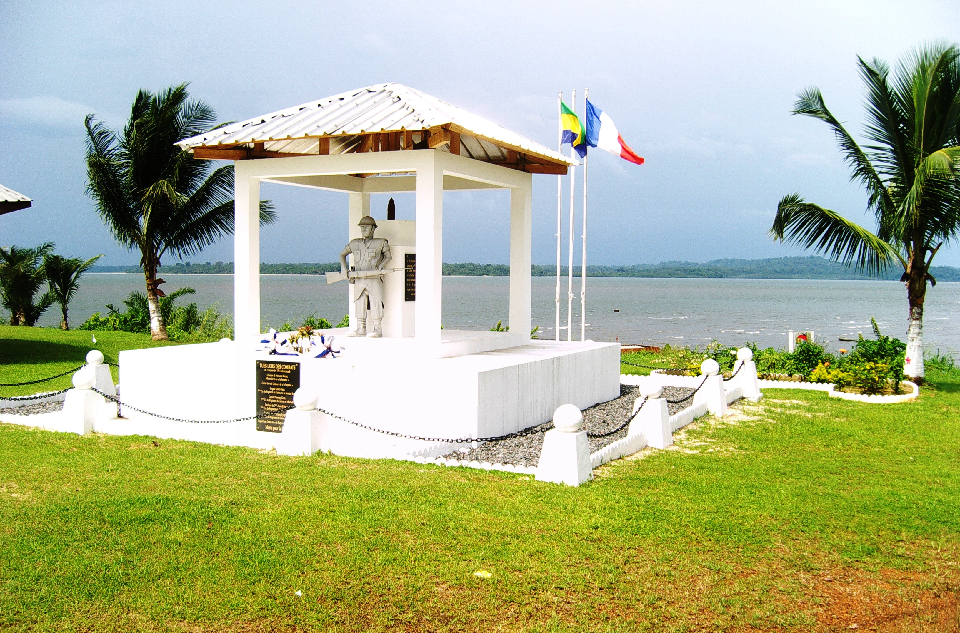 Guerre mondiale de 1914 à Cocobeach au Gabon